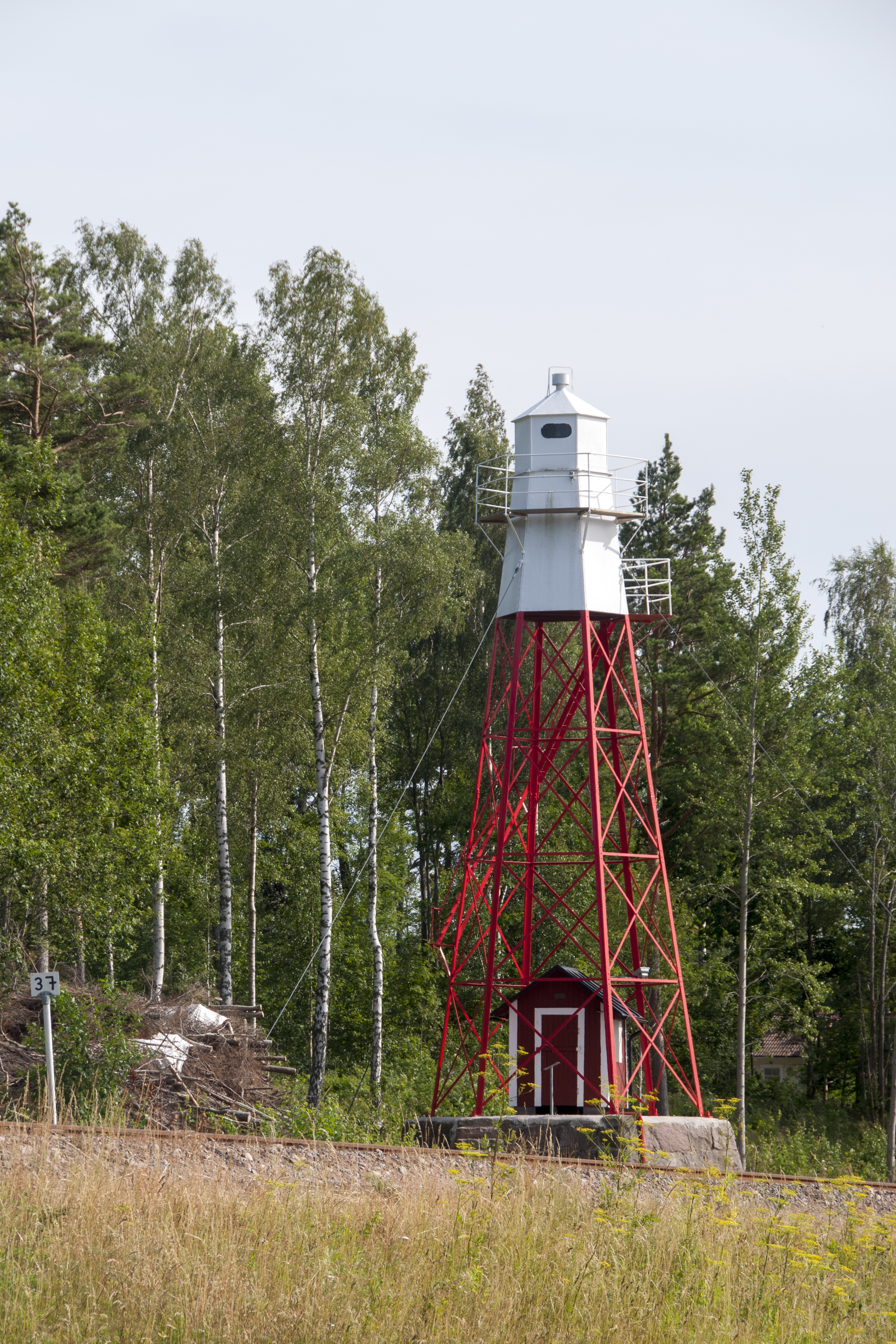 Snuggens fyr i Mariestad byggd 1904. Renoverad 2013.